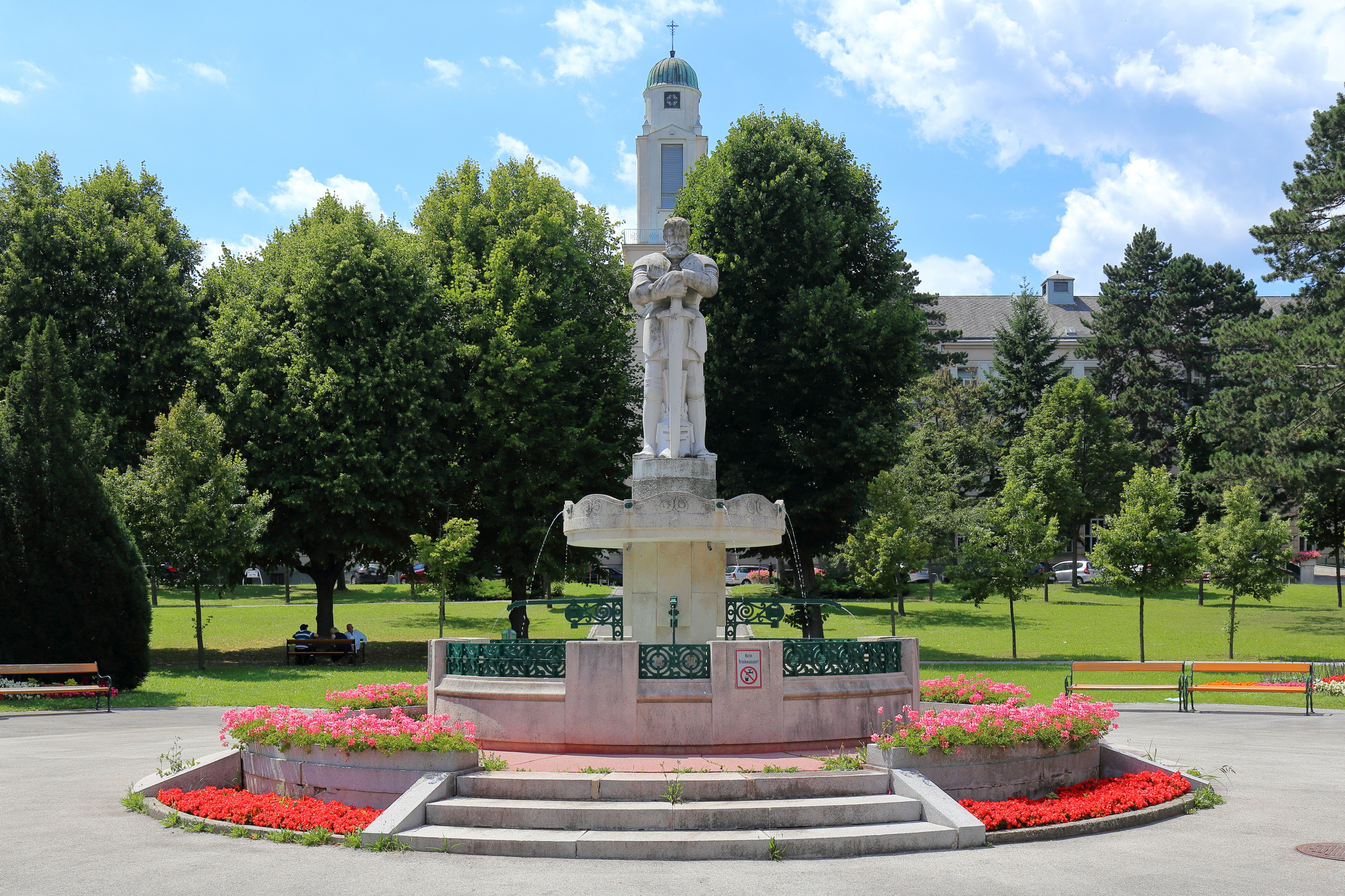 Der Rolandbrunnen im Zentrum des großen Gartenhofes beziehungsweise in der Hauptachse des Krankenhauses Hietzing im 13. Wiener Gemeindebezirk Hietzing. Der monumentale Brunnen wurde im Zuge der Errichtung des Krankenhauses in Auftrag gegeben und um 1913 enthüllt. Auf einem dreistufigem Podest, bei dem zwei Stufen als Brunnenbecken ausgebildet sind, steht eine monumentale Rolandstatue, die von dem akademischen Bildhauer Josef Heu geschaffen wurde und angeblich die Züge des Wiener Bürgermeister Karl Lueger zeigt. Im Hintergrund der Pavillon IV, in der sich die Krankenhauskapelle befindet.